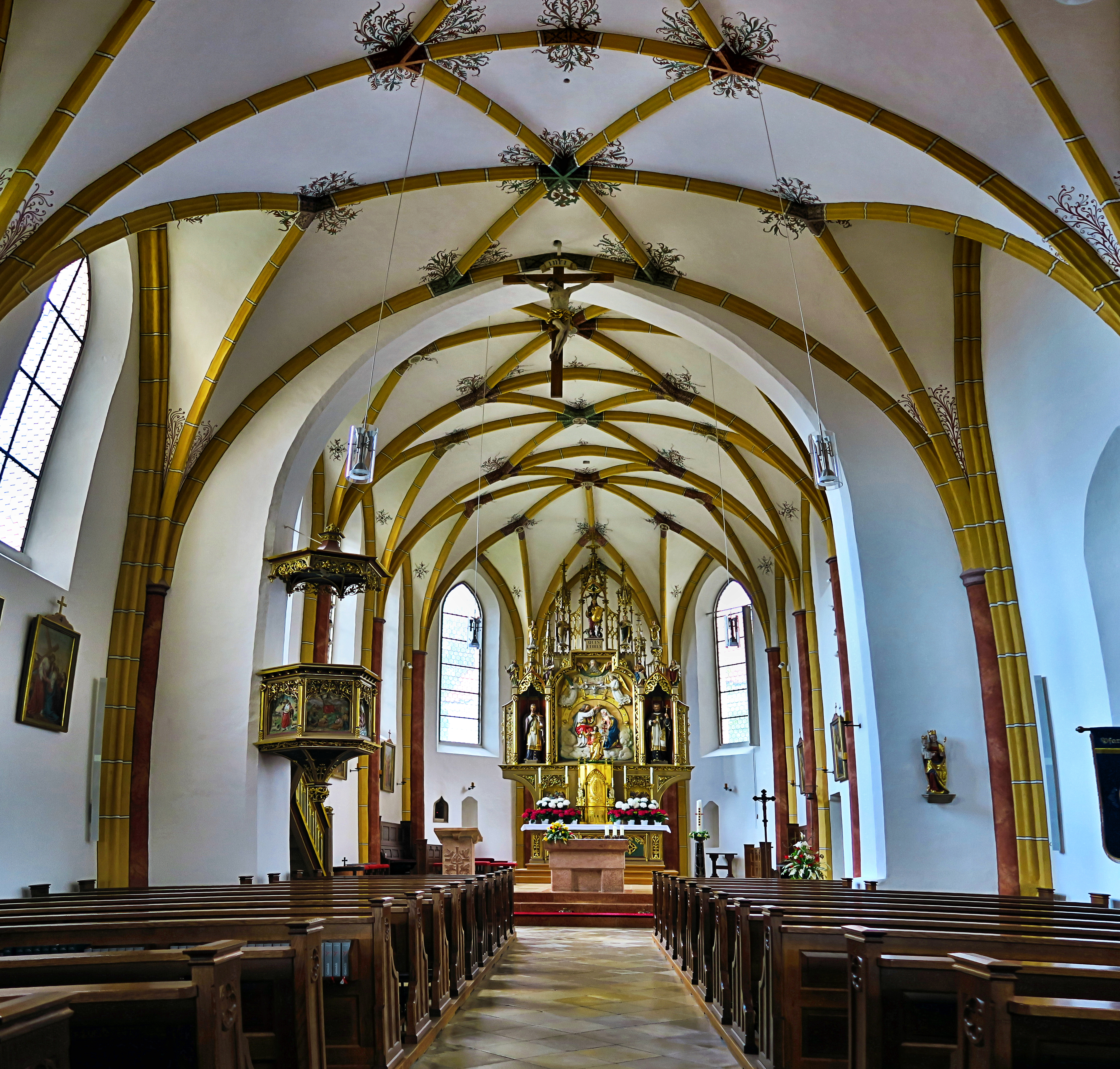 Deutschland, Bayern, Oberbayern, Landkreis Rottal-Inn, Bad Birnbach, Katholische Pfarrkirche "Maria Himmelfahrt" Innenraum